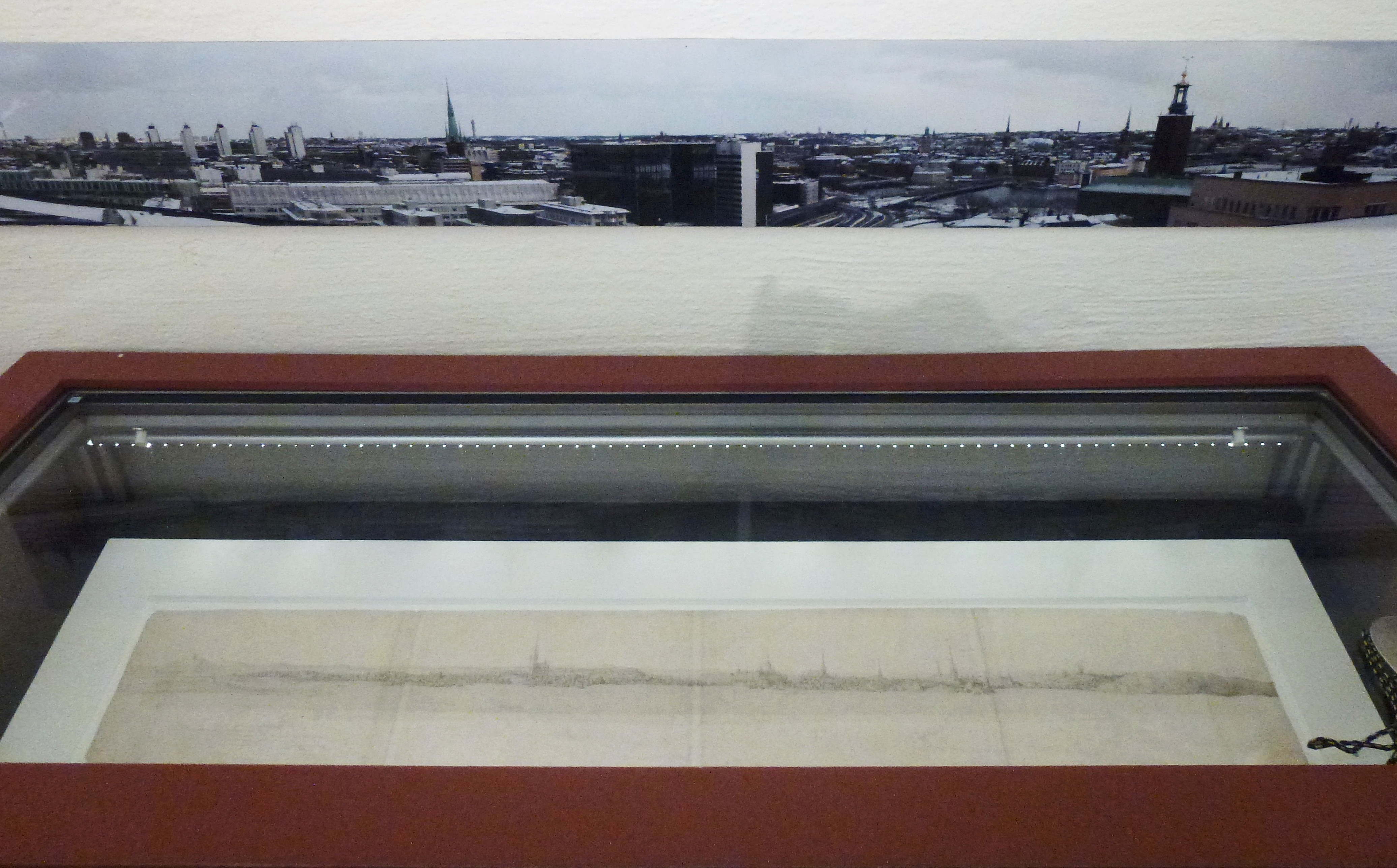 Stockholms stadsmuseum, utställning av 1600-tals panoramat